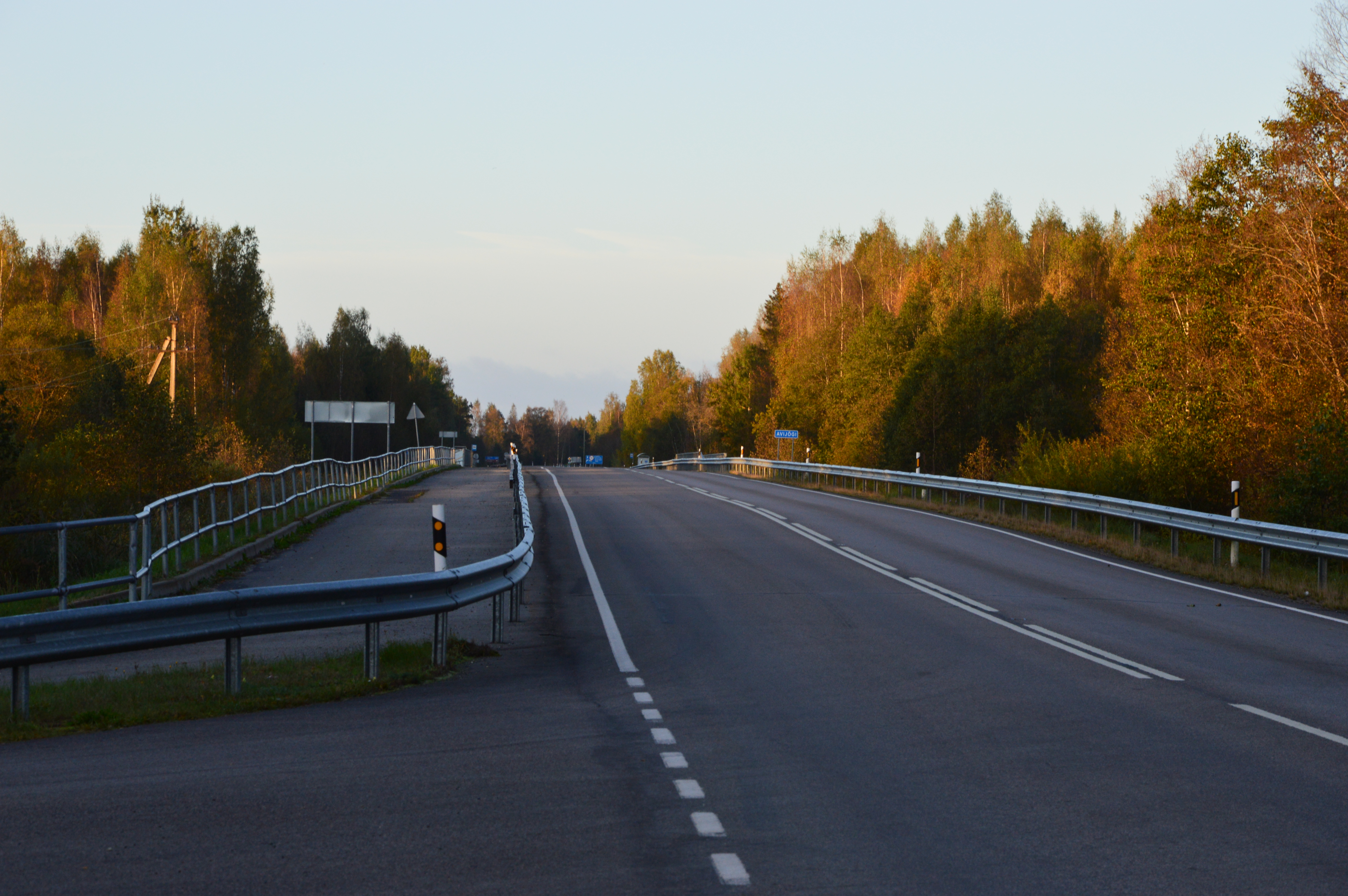 Jõhvi–Tartu–Valga põhimaantee Lohusuu alevikus.